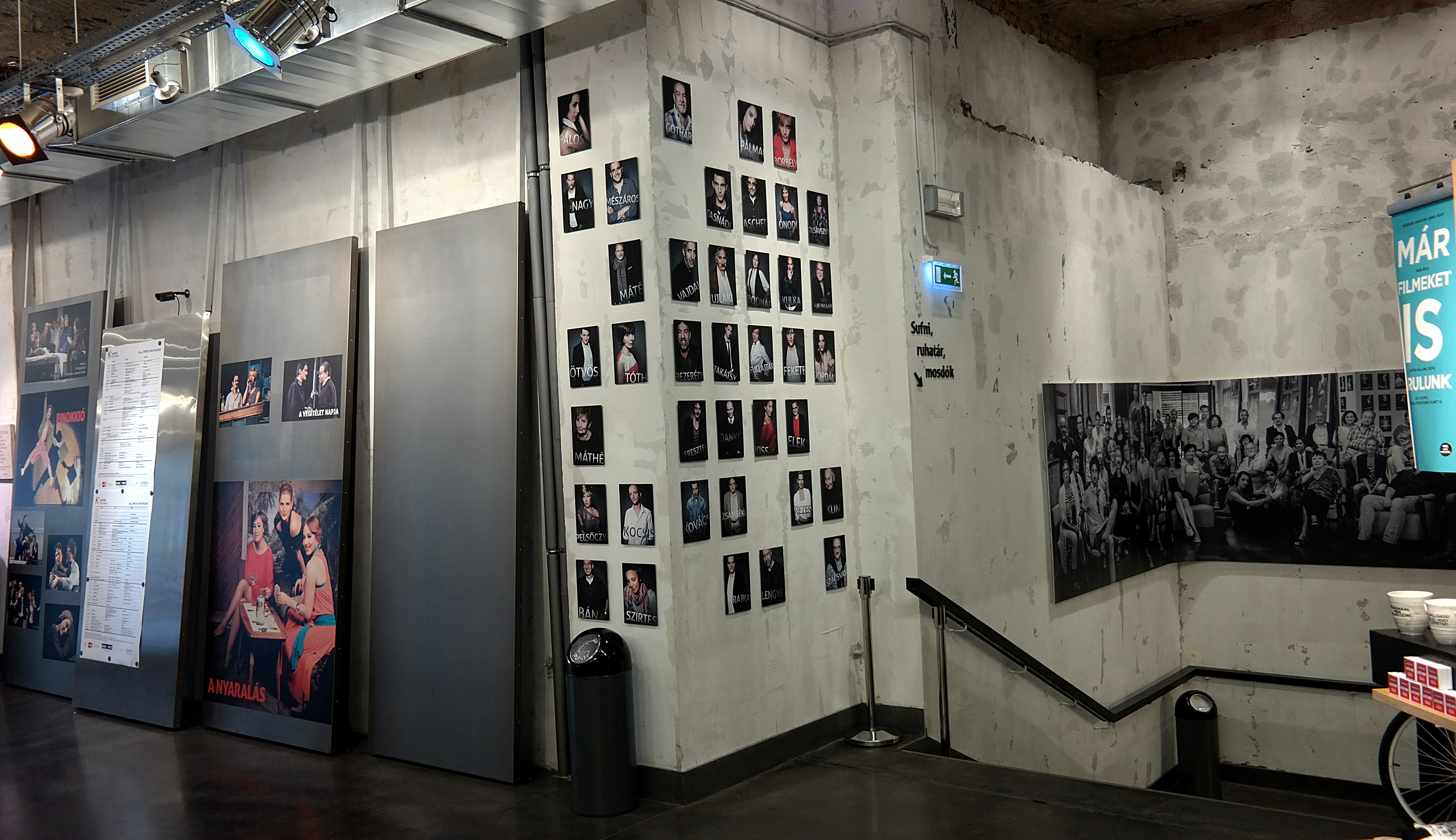 Katona József Színház K:antin, fogadótér. Budapest V. kerület, Petőfi Sándor utca.